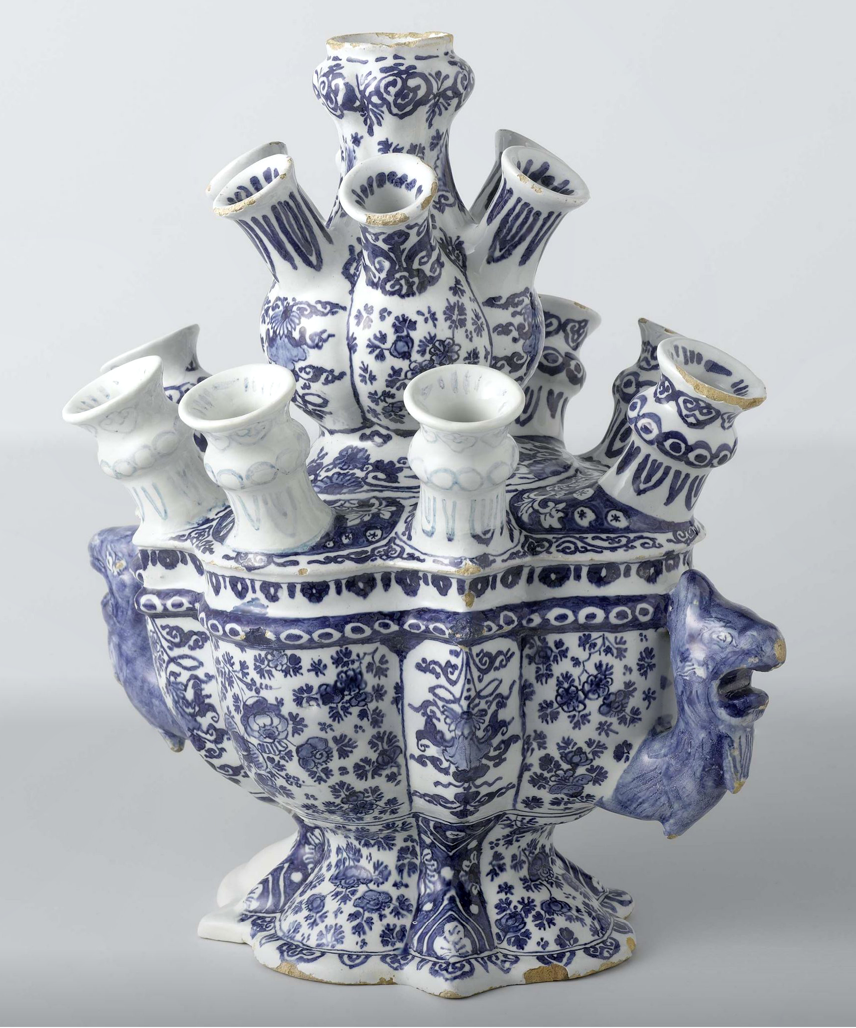 Faïence de Lambertus van Eenhoorn fabriquée entre 1690 et 1720 à Delft. Cette tulipière servait à disposer une fleur dans chacun des becs. Elle en compte quinze et deux têtes de griffon en guise de poignées.